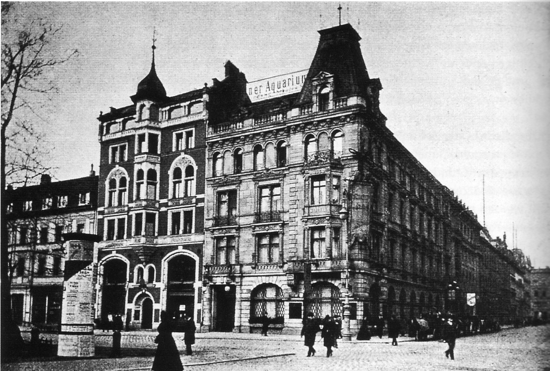 Gebäude Unter den Linden/Ecke Schadowstraße in Berlin, Standort des "Berliner Aquarium Unter den Linden" von 1869 bis 1910.